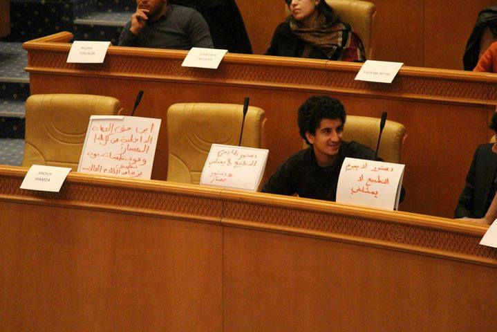 قصي بن فرج في المجلس التأسيسي الشبابي حين كان عمره 16 سنة , رافعا شعار " دستور لا يجرّم التطبيع مع الصهاينة لا يمثلني